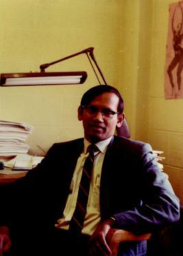 Foto di Dwijendra Kumar Ray-Chaudhuri